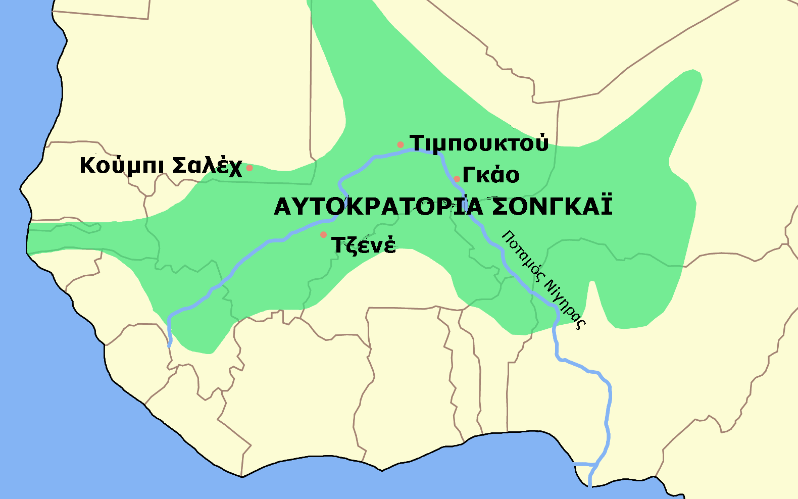 Χάρτης της Αυτοκρατορίας Σονγκάι